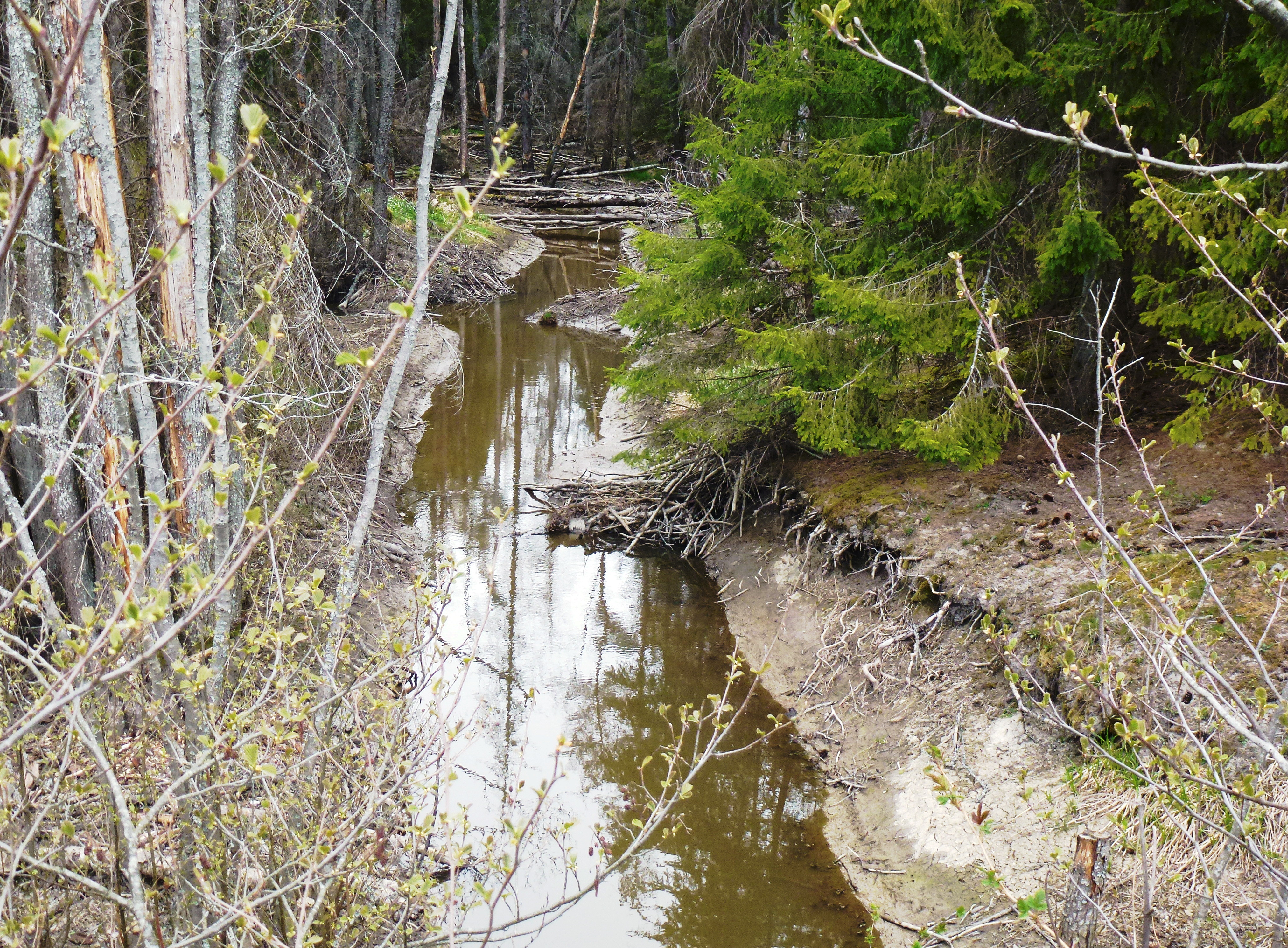 Brinkbäckens ravin och naturreservat (längst i öst)